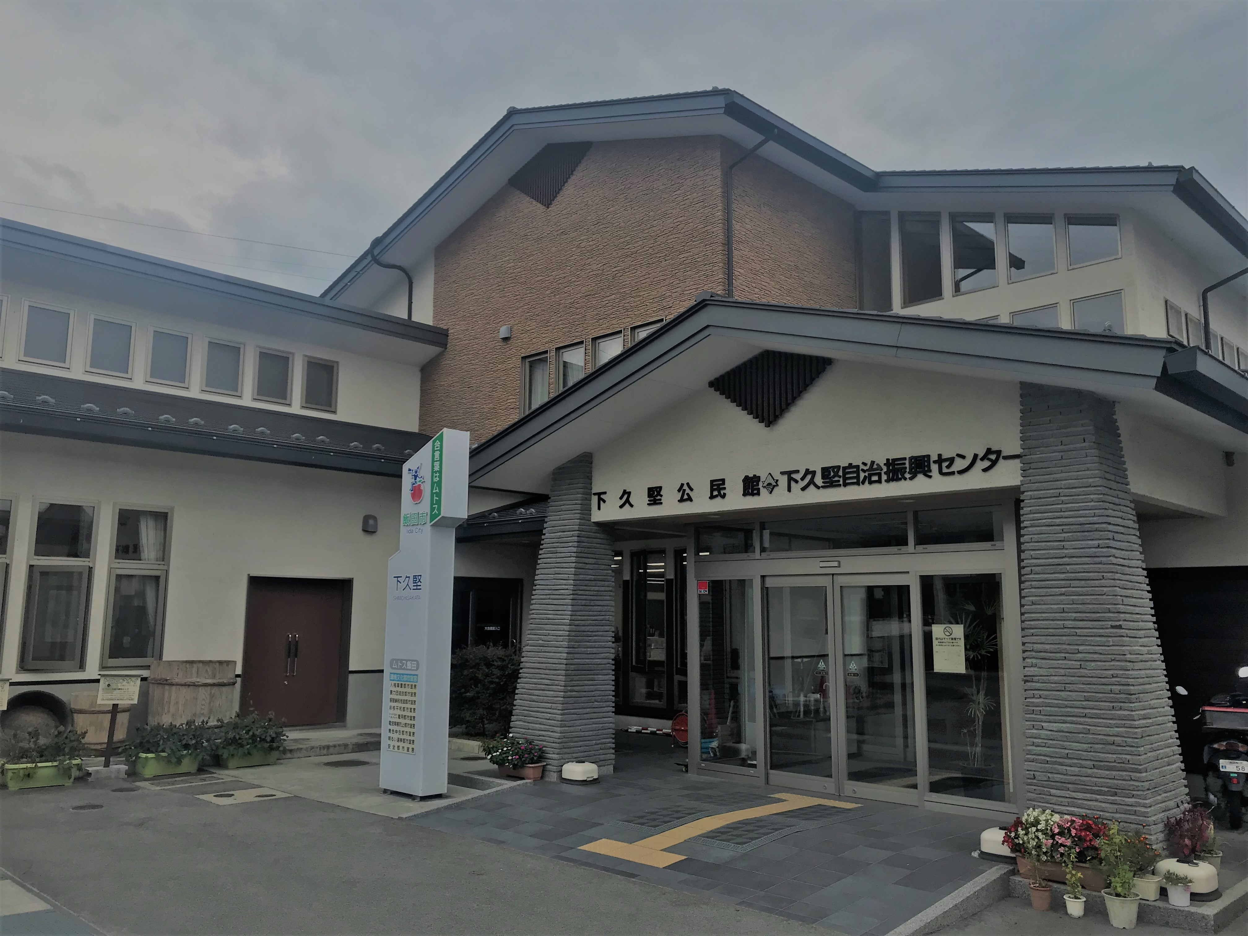 平成２６年に完成した新しい下久堅公民館の建物です。自治振興センターと図書館を併設しています。